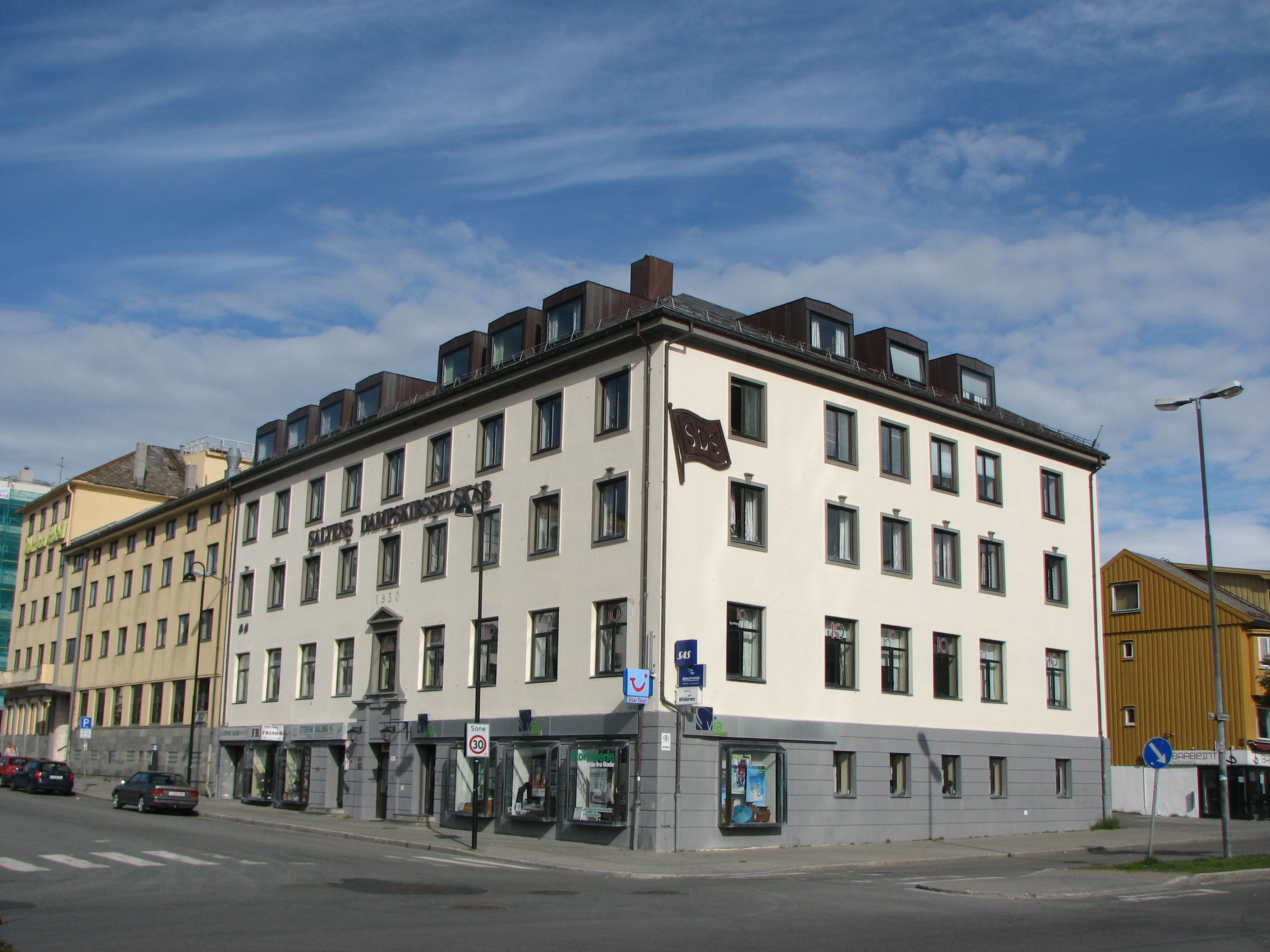 Saltens Dampskibsselskab bygget. Tidligere hovedkontor til rederiet.